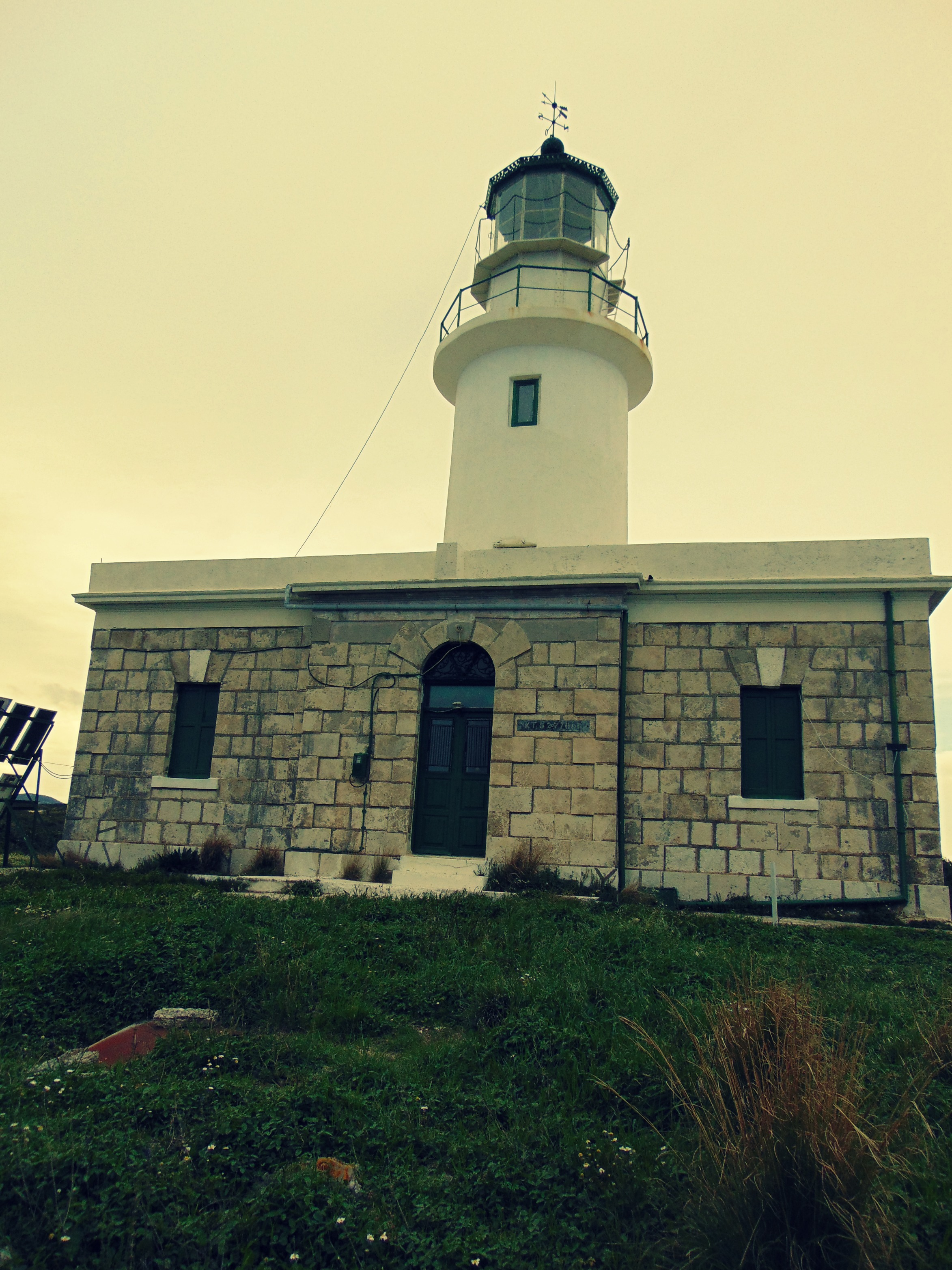 Φάρος Οθωνών